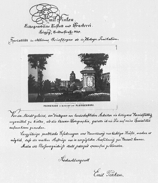 Werbe-Brief der lithographischen Kunstanstalt Emil Pinkau, Leipzig, 1877. Kreide- und Feder-Lithographie, Platten-Kolorierung, 28,6 x 22,3 cm Text: "Specialität in Albums, Briefbogen etc. in Photogr. Imitation. Von der Absicht geleitet, den Verlegern von landschaftlichen Arbeiten ein billigeres Vervieflältigungsmittel zu bieten, als die theure Photographie, gestatte ich mir Sie auf meine Specialität aufmerksam zu machen. Langjährige praktische Erfahrung und Verwendung nur tüchtiger Kräfte, machen es möglich, dass die werthen Aufträge nur in vorzüglicher Ausführung zum Versand kommen. Muster und Preisverzeichnis steht jederzeit spesenfrei zu Diensten. Hochachtungsvoll Emil Pinkau" Abbildung: Promenade und Blick auf die Pleissenburg